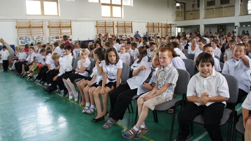 Évzáró